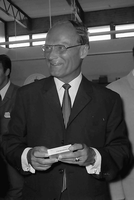 Oberbürgermeister Dr. Keidel anlässlich des Besuchs des Freiburger Stadtrats und des Oberbürgermeisters bei Farmitalia in Freiburg